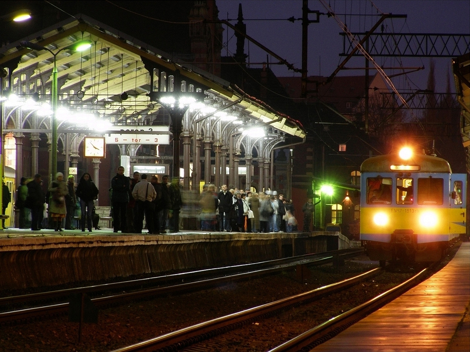 To jest zdjęcie Szybkiej Kolei Miejskiej, pochodzące z serwisu Flickr, autorstwa poulbrokl, i umieszczone na Wiki Commons na zasadzie "creatice commons".